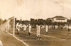 Partida entre São Bento e XV de Piracicaba - 1917